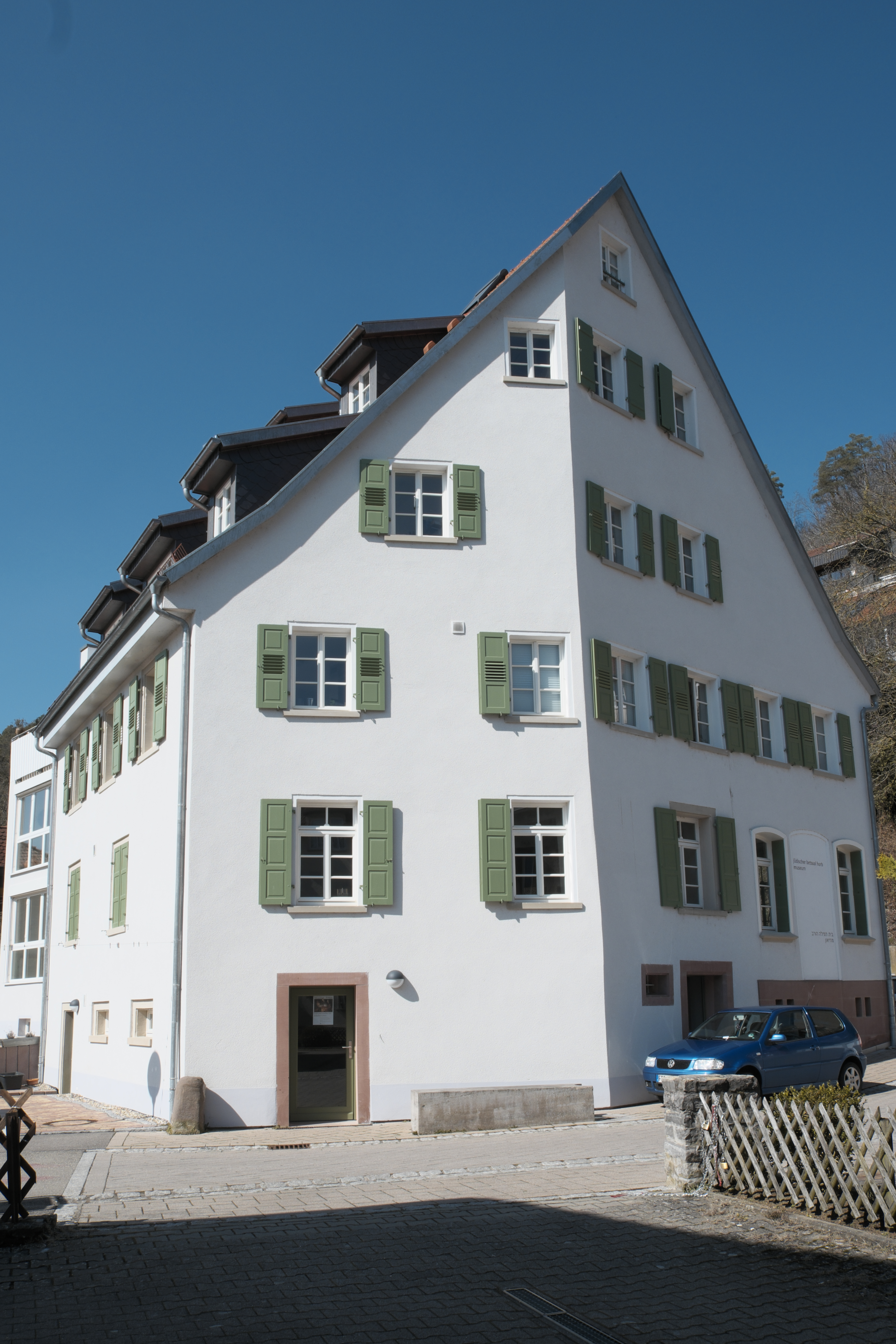 Jüdischer Betsaal am Dr.-Abraham-Schweizer-Platz in Horb am Neckar im Landkreis Freudenstadt (Baden-Württemberg/Deutschland)